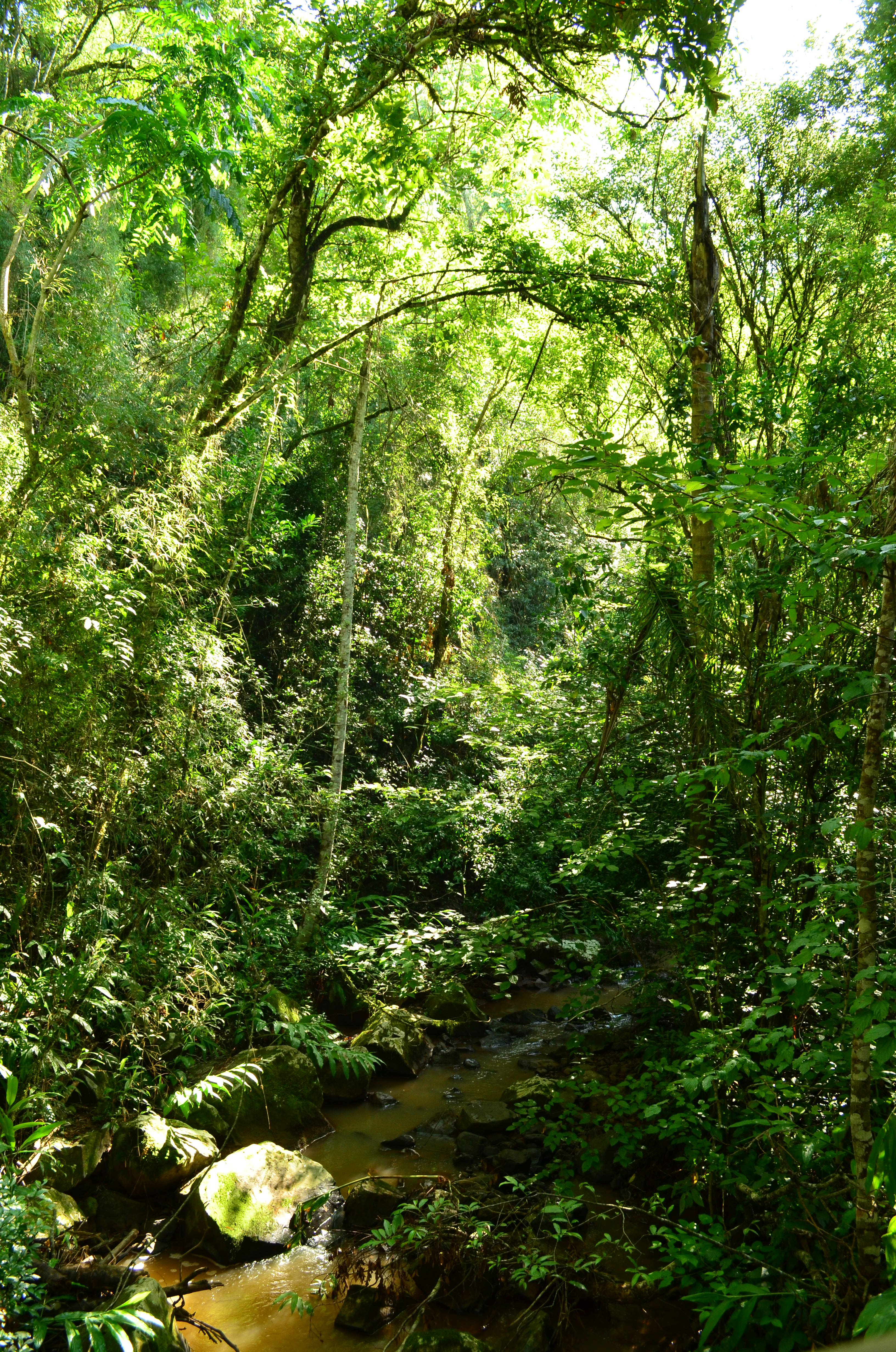 As trilhas estão entre os principais atrativos do parque. Árvores e rio fazem parte da paisagem e acompanham durante a caminhada.